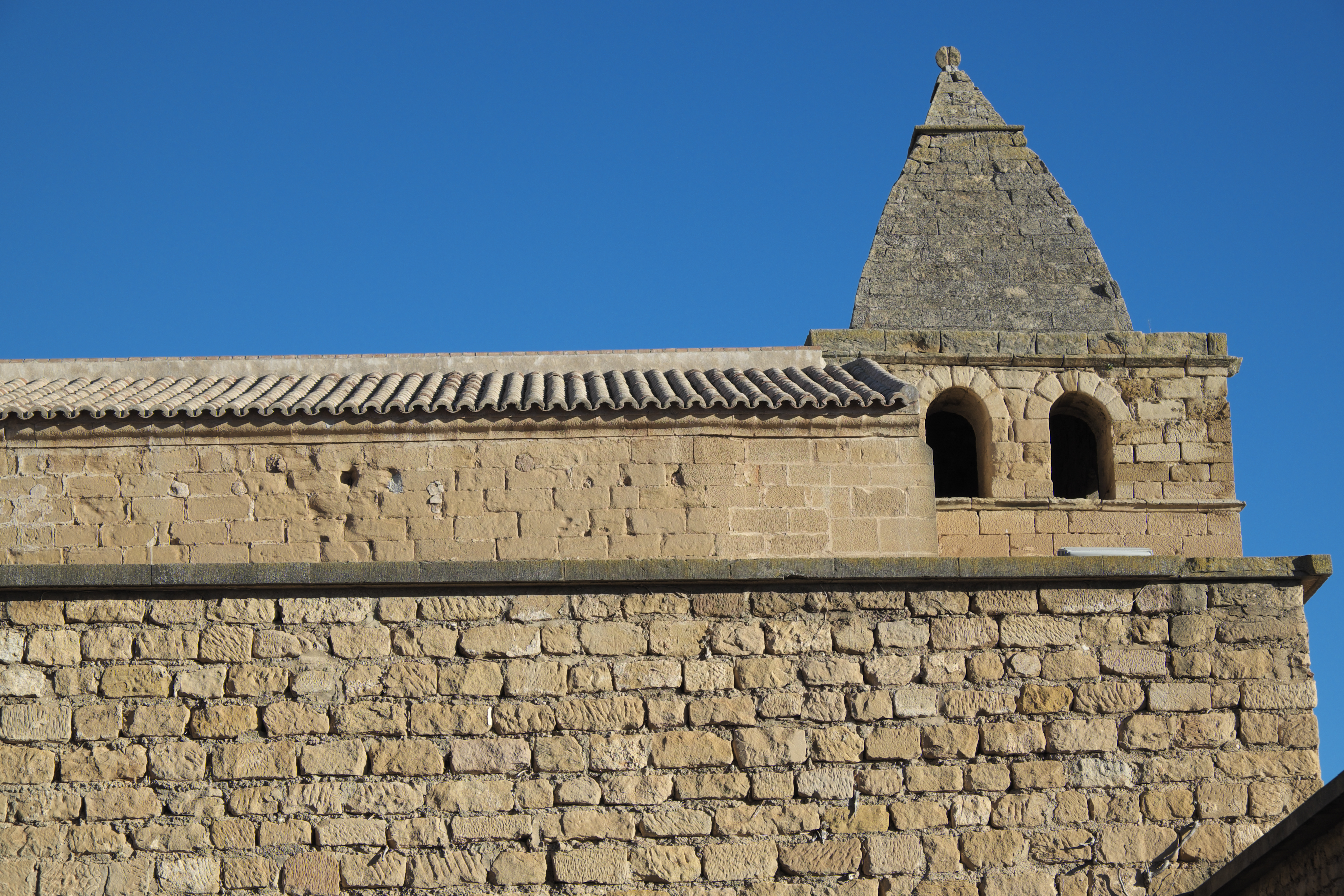 Castillo-Convento von Alcañiz in der Provinz Teruel (Aragonien/Spanien), Capilla Santa María Magdalena mit Torre de Lanuza und Mauer des Kreuzganges